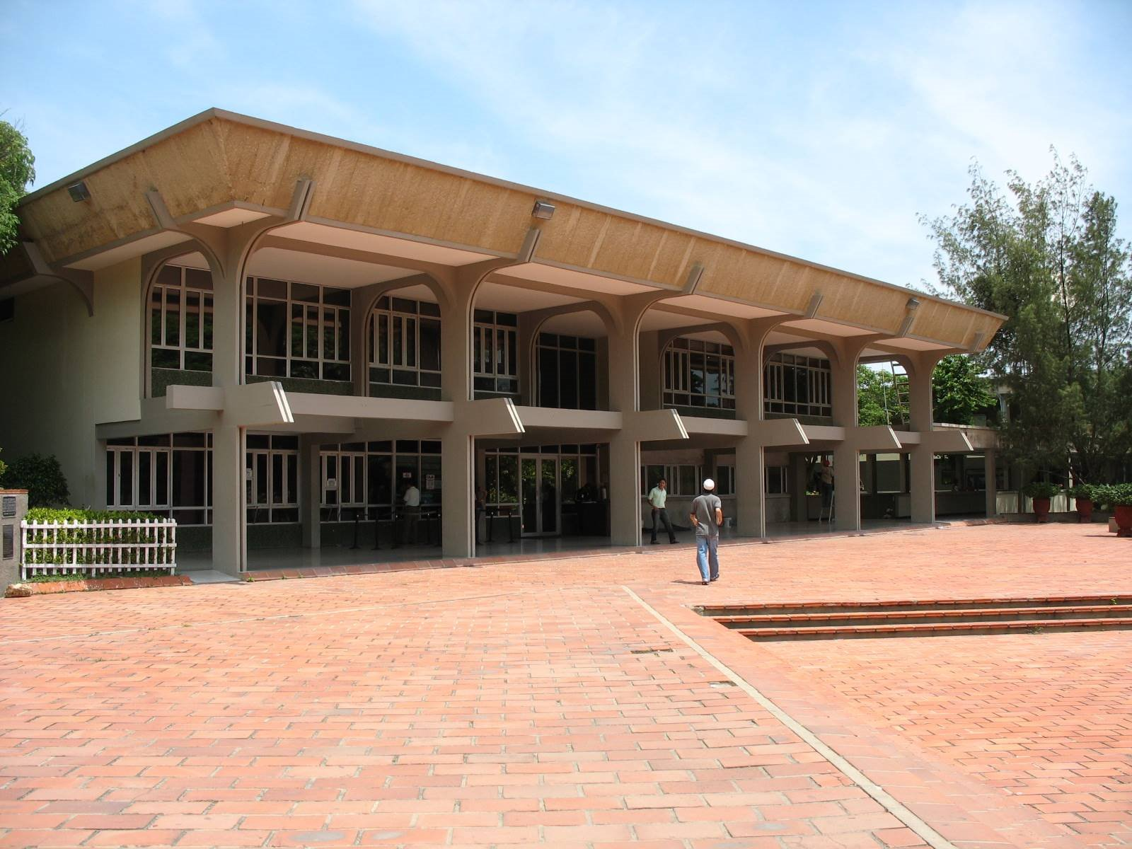 Barranquilla Universidad del Norte